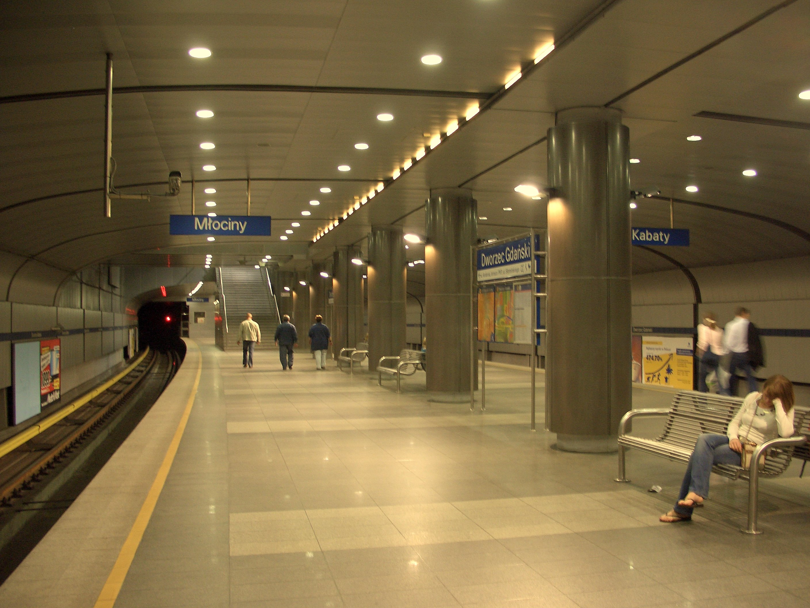 Warsaw Metro station - A-17 Dworzec Gdański